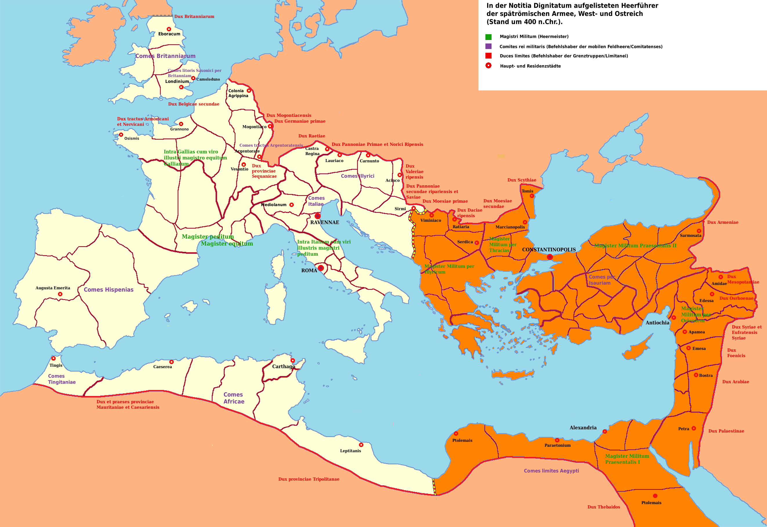 Magistri Milites, Comites rei militaris und Duces-Limites der spätrömischen Armee in West- und Ostrom (Stand Anfang des 5. Jahrhundert n.Chr.).